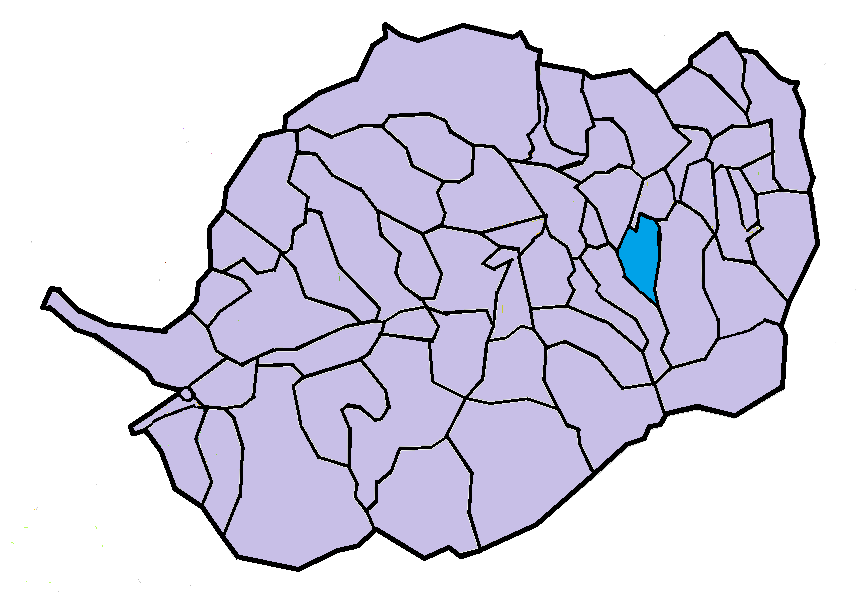 Clarà i Villerac en el Conflent, a partir del mapa municipal del Conflent de lliure disposició adaptat al Nomenclàtor toponímic aprovat el 2007